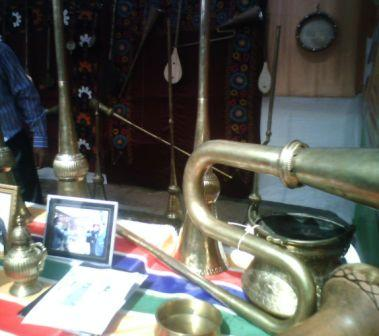 Народные духовие инструменты из меди - Истравшан 2011